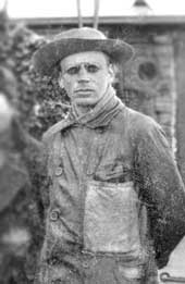 Владимир Юльевич Визе в экспедиции Г. Я. Седова. У берегов Земли Франца-Иосифа